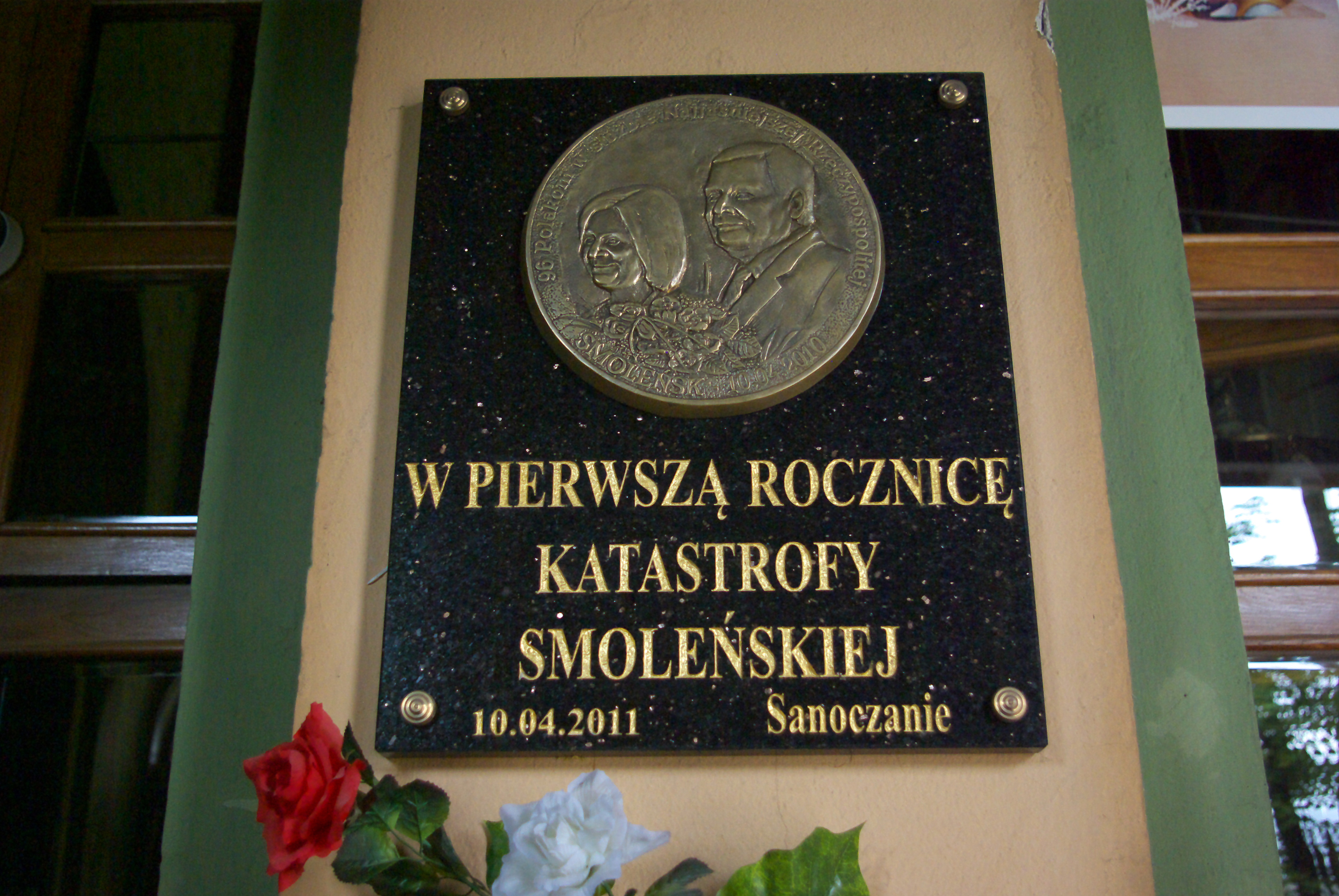 Kościół Przemienienia Pańskiego w Sanoku - tablica pamiątkowa upamiętniająca Katastrofę Smoleńską 10.04.2010